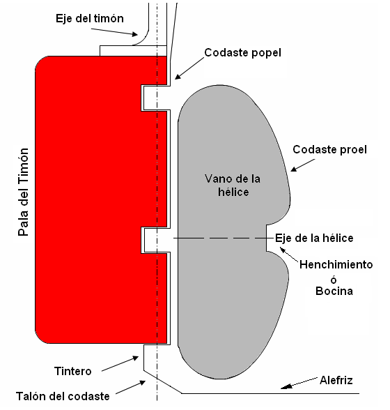 Gráfico del codaste y despiece(spanish)